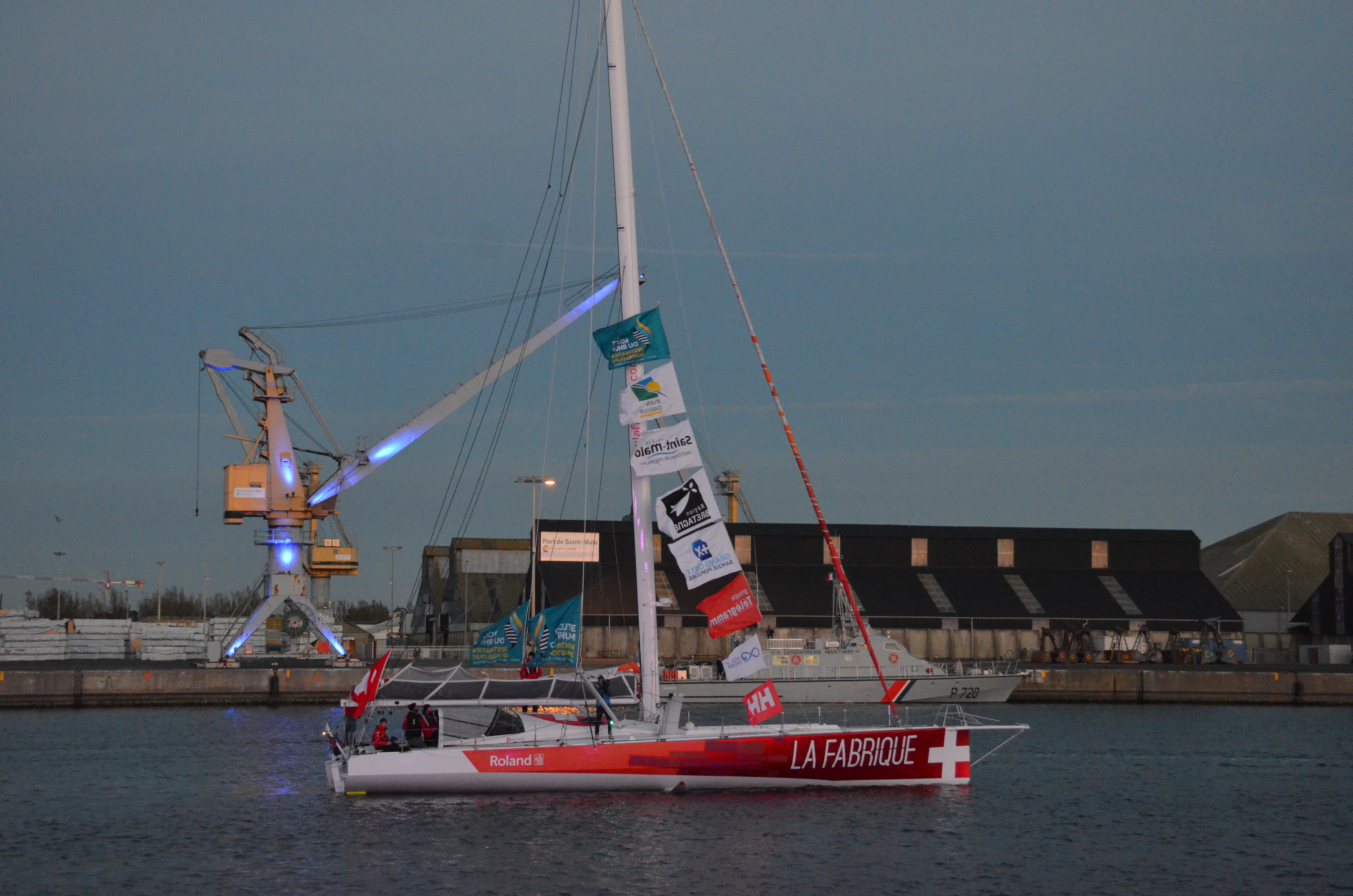 Alan Roura au départ de la Route du Rhum 2018